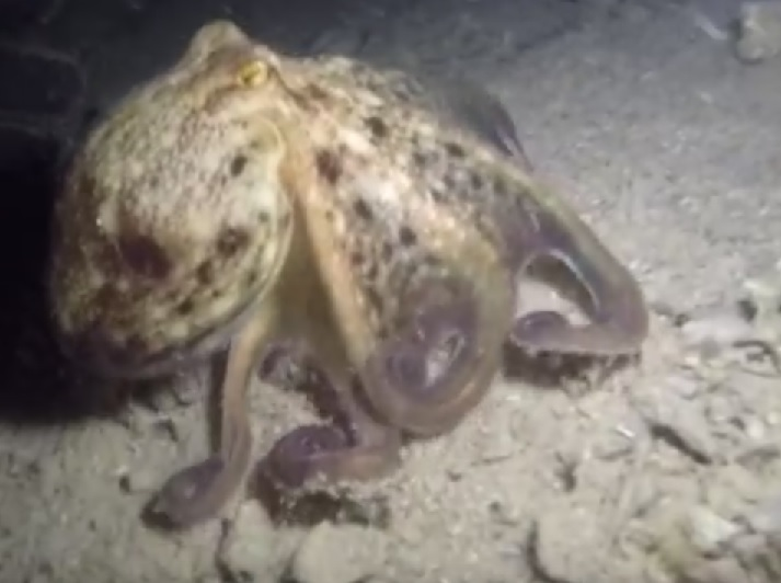 Moschuskrake von der Seite - Bucht von Neum (Bosnien und Herzegowina)